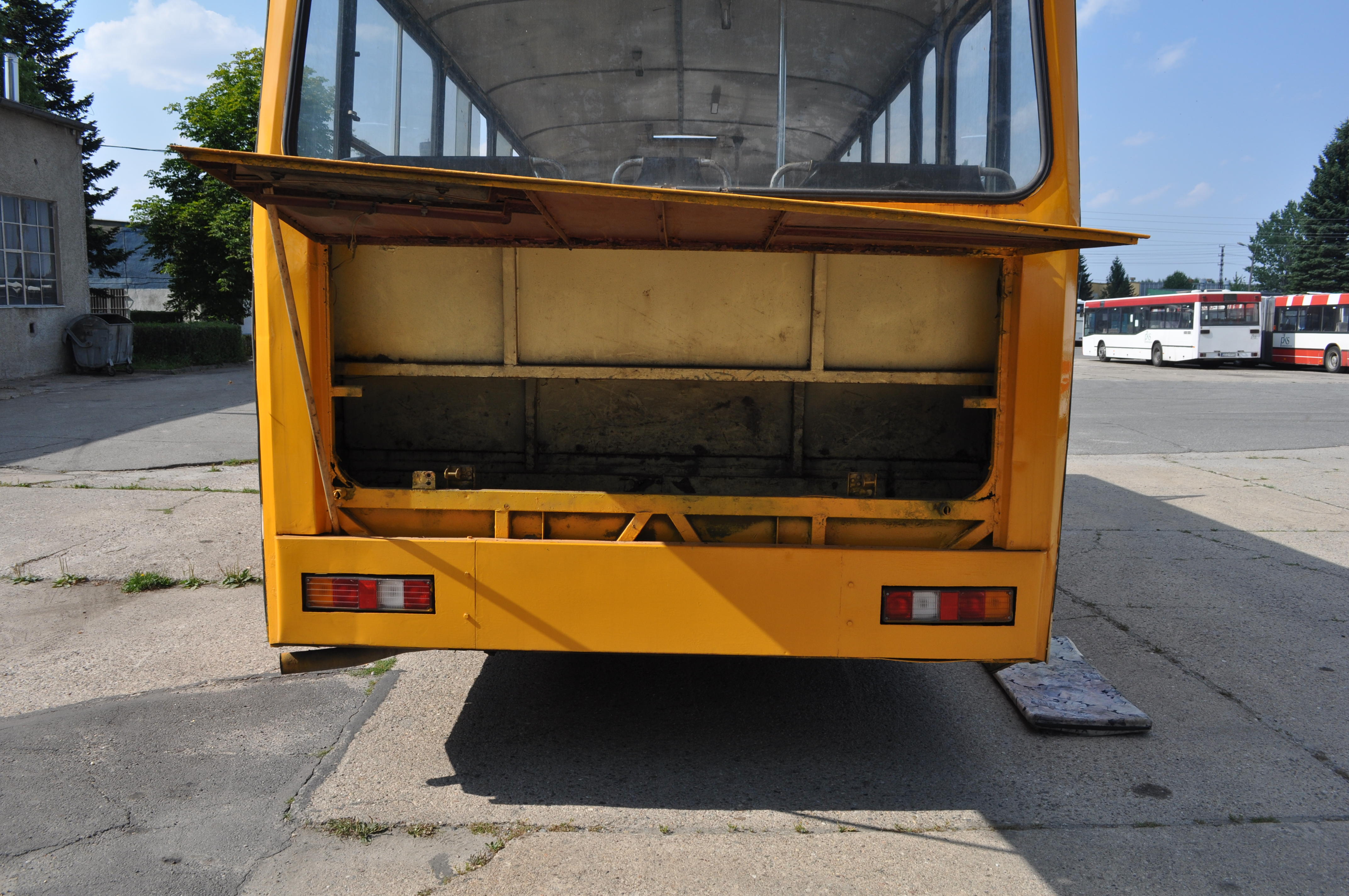 Jelcz 080. Bagażnik. Zdjęcie wykonane dzięki uprzejmości Adama Zylbertala z Klubu Sympatyków Transportu Miejskiego z Wrocławia. jelcz080.pl